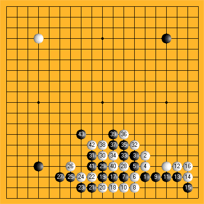 围棋棋谱：王积薪vs骊山老媪。本人制作的图片 Image:China go1.png